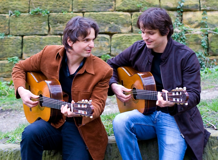 Katona Twins taken in St James's Gardens, Liverpool.